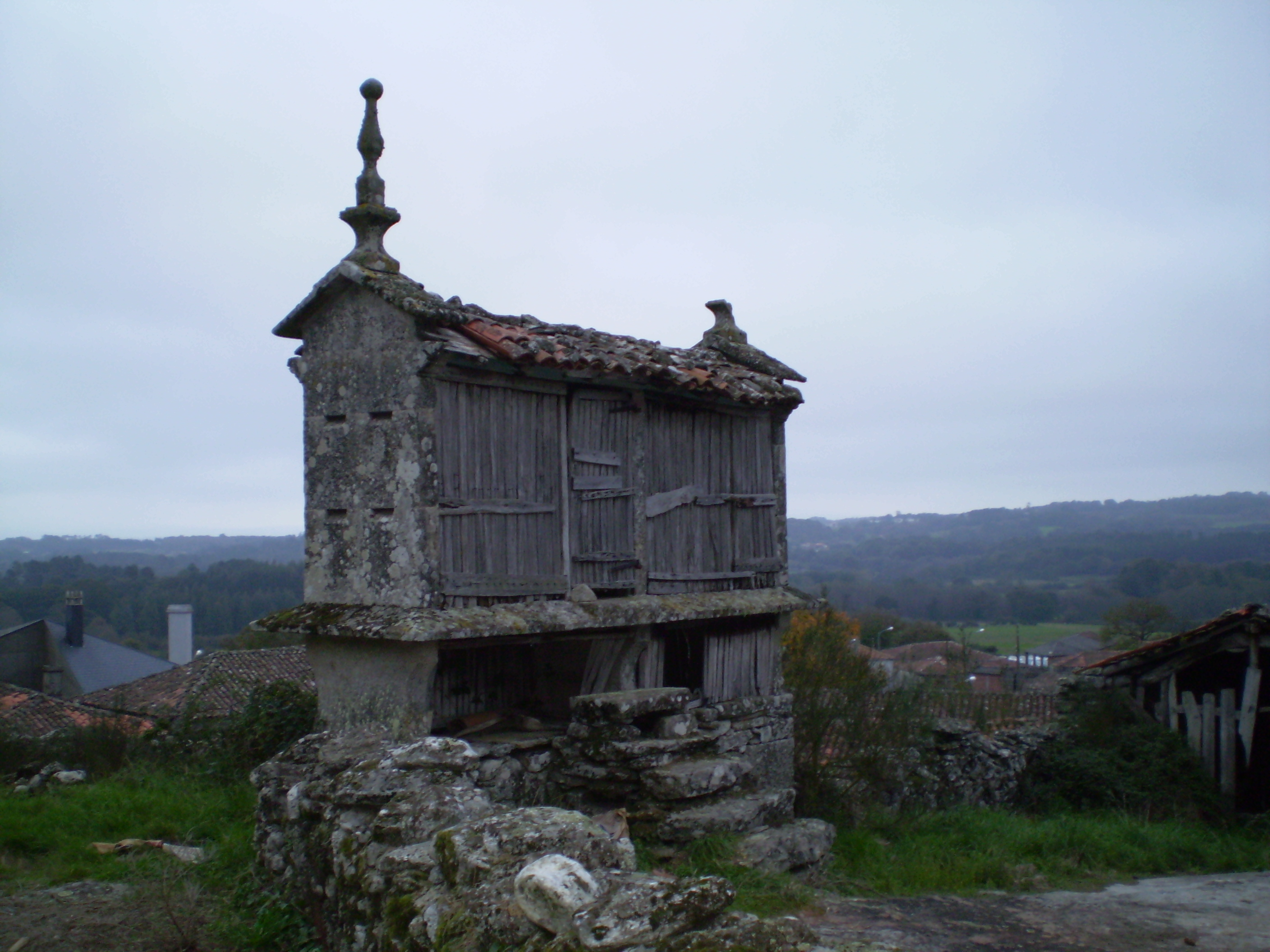 Hórreo en Rececendes (Antas de Ulla)